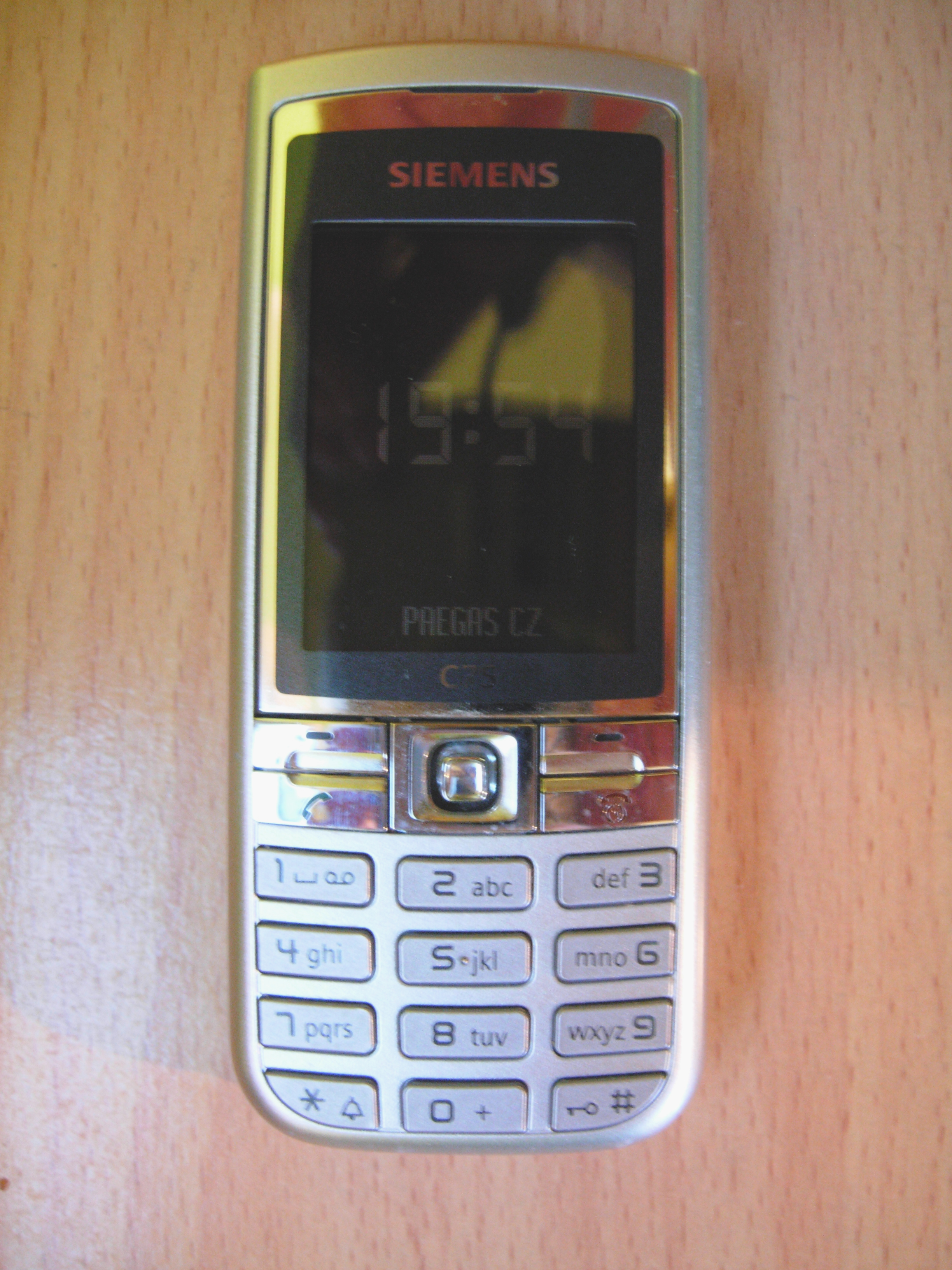 Siemens C75 mobile phone